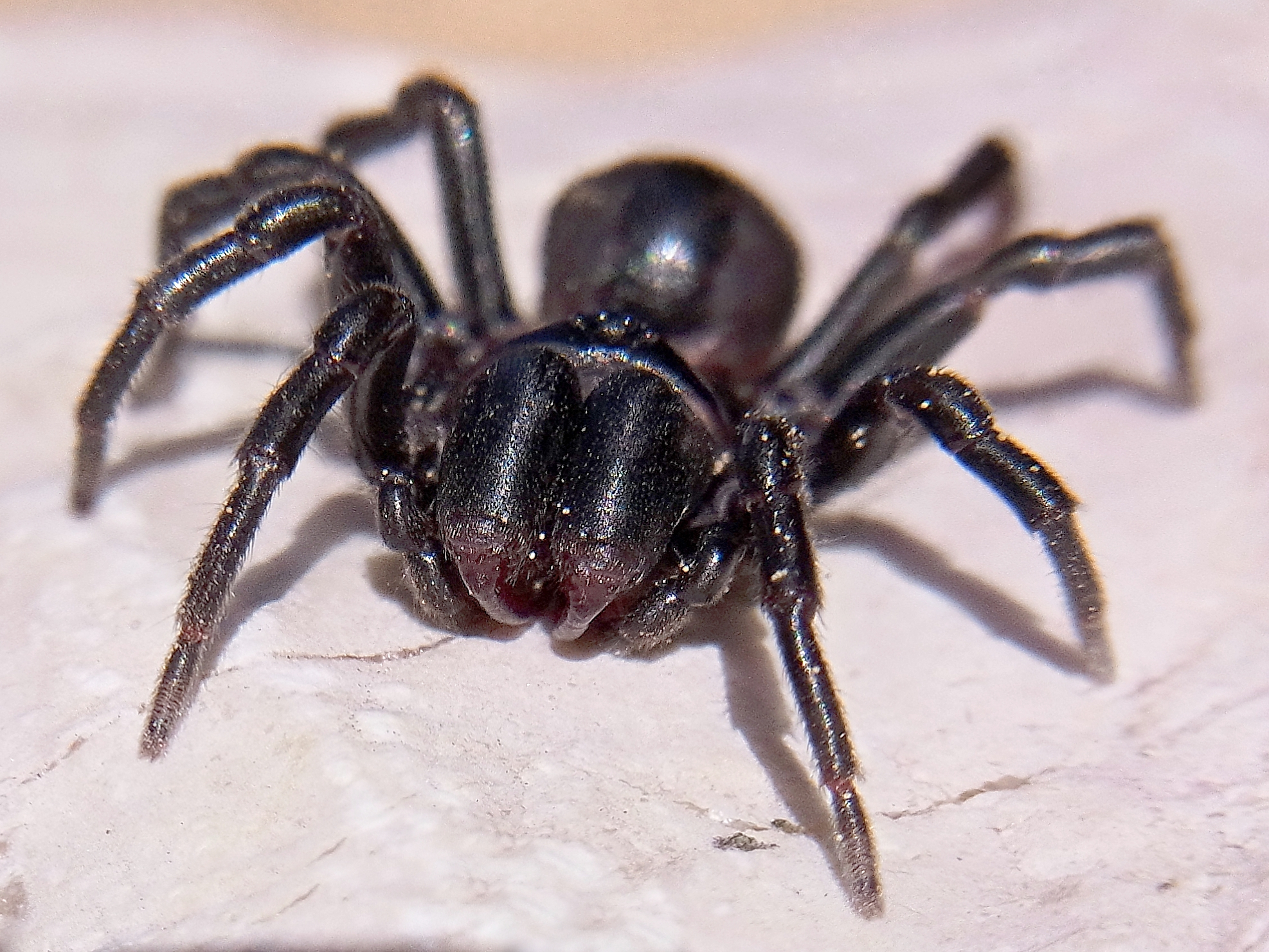 Atypus affinis, Männchen aus Süddeutschland, zwischen Tuttlingen und Rottweil, 700m, im Gartenteich ertrunken